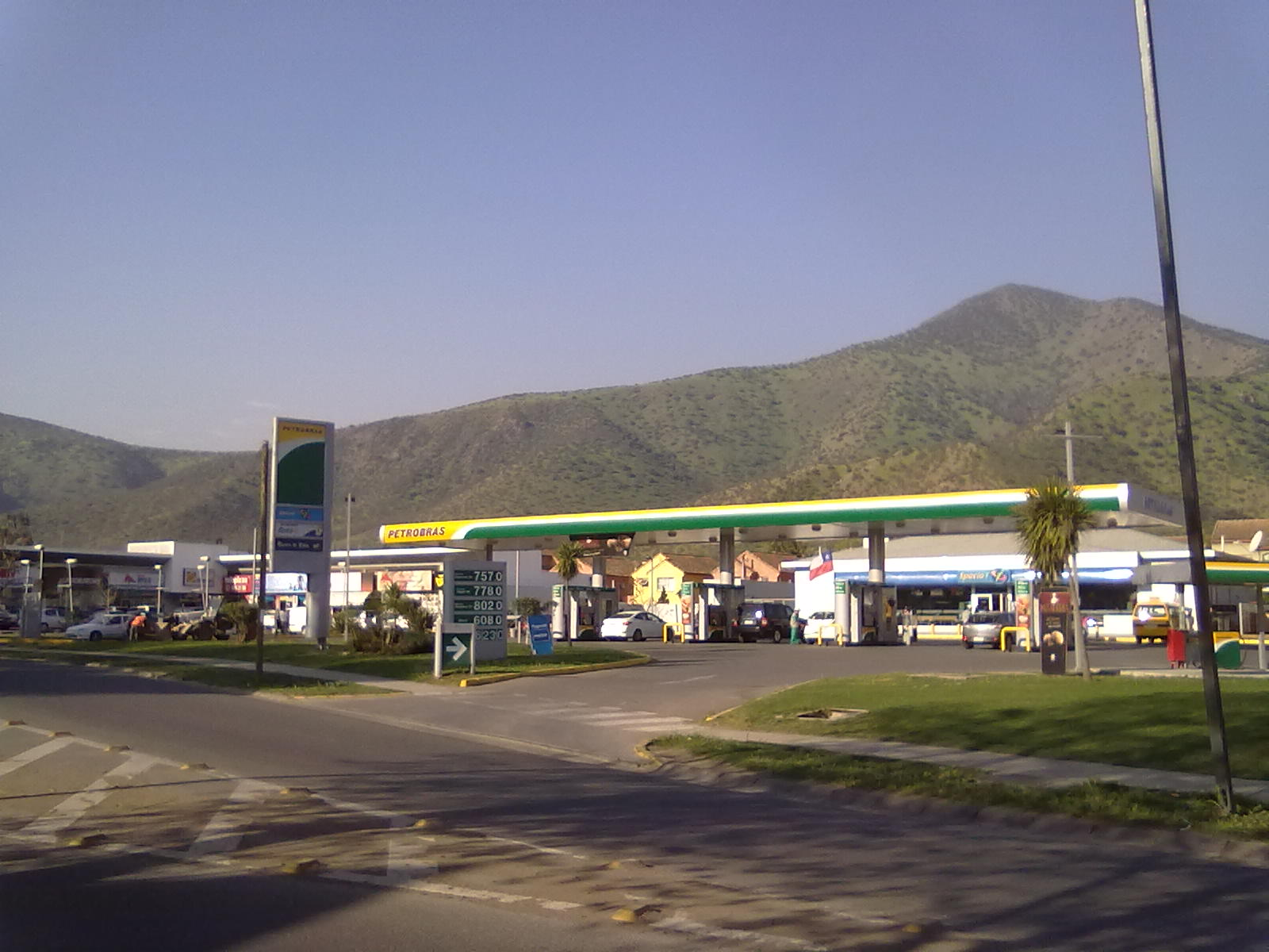 Estacion de Servicio Petrobras en Santiago de Chile